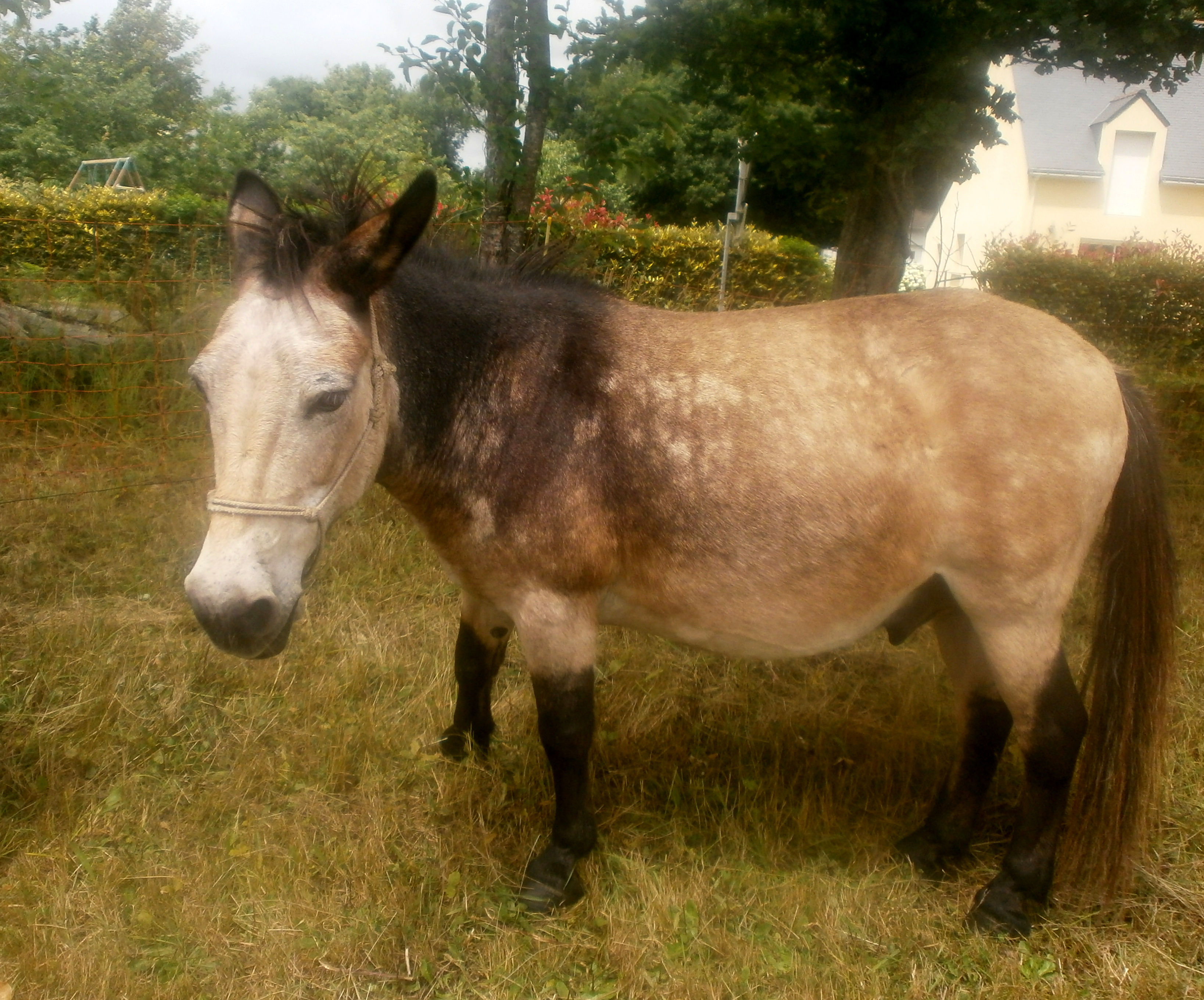 à la fête du cheval de Saint-Guyomard 2016